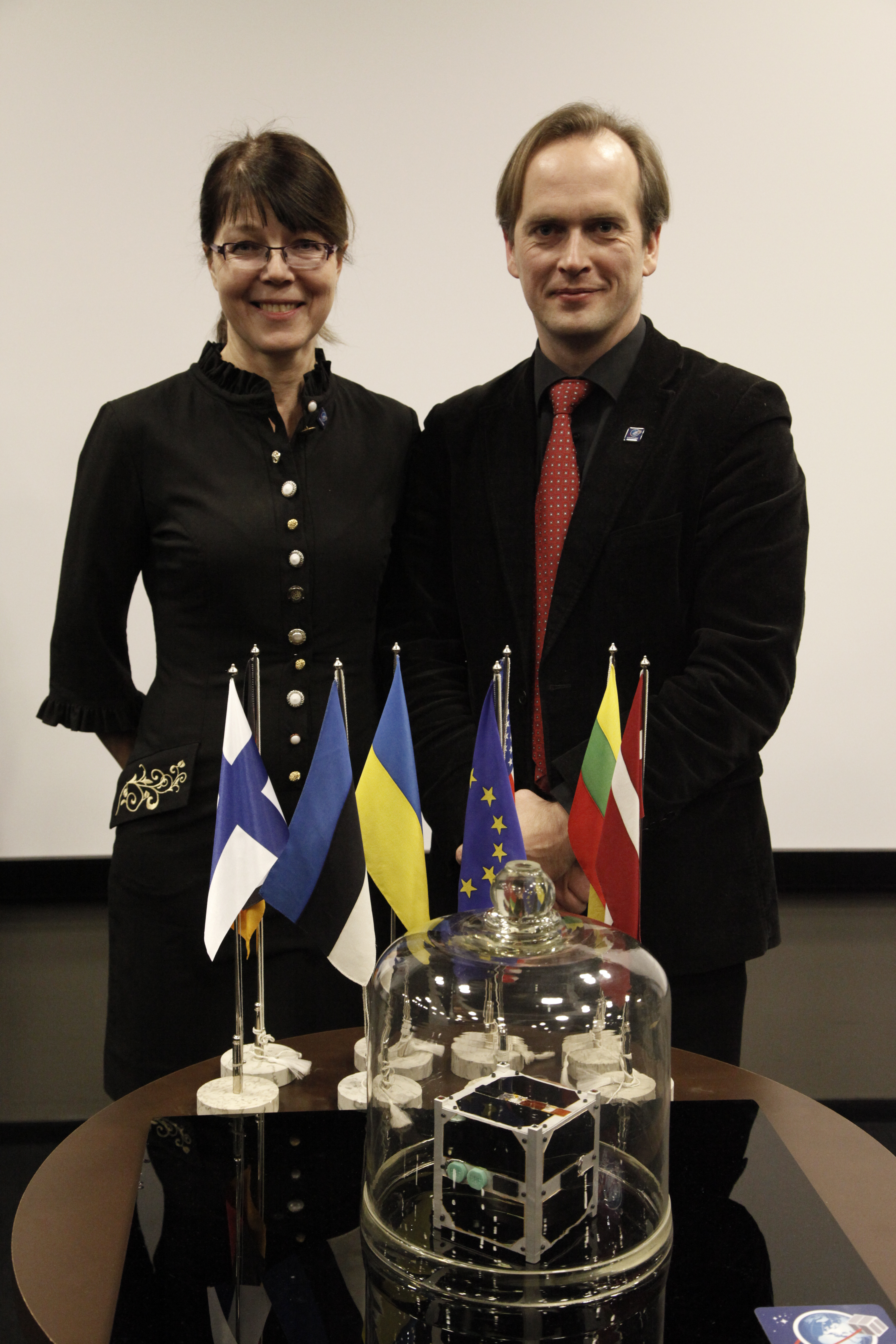 Anu Reinart ja Mart Noorma ESTCube-1 esitlusel Tallinna teletornis.